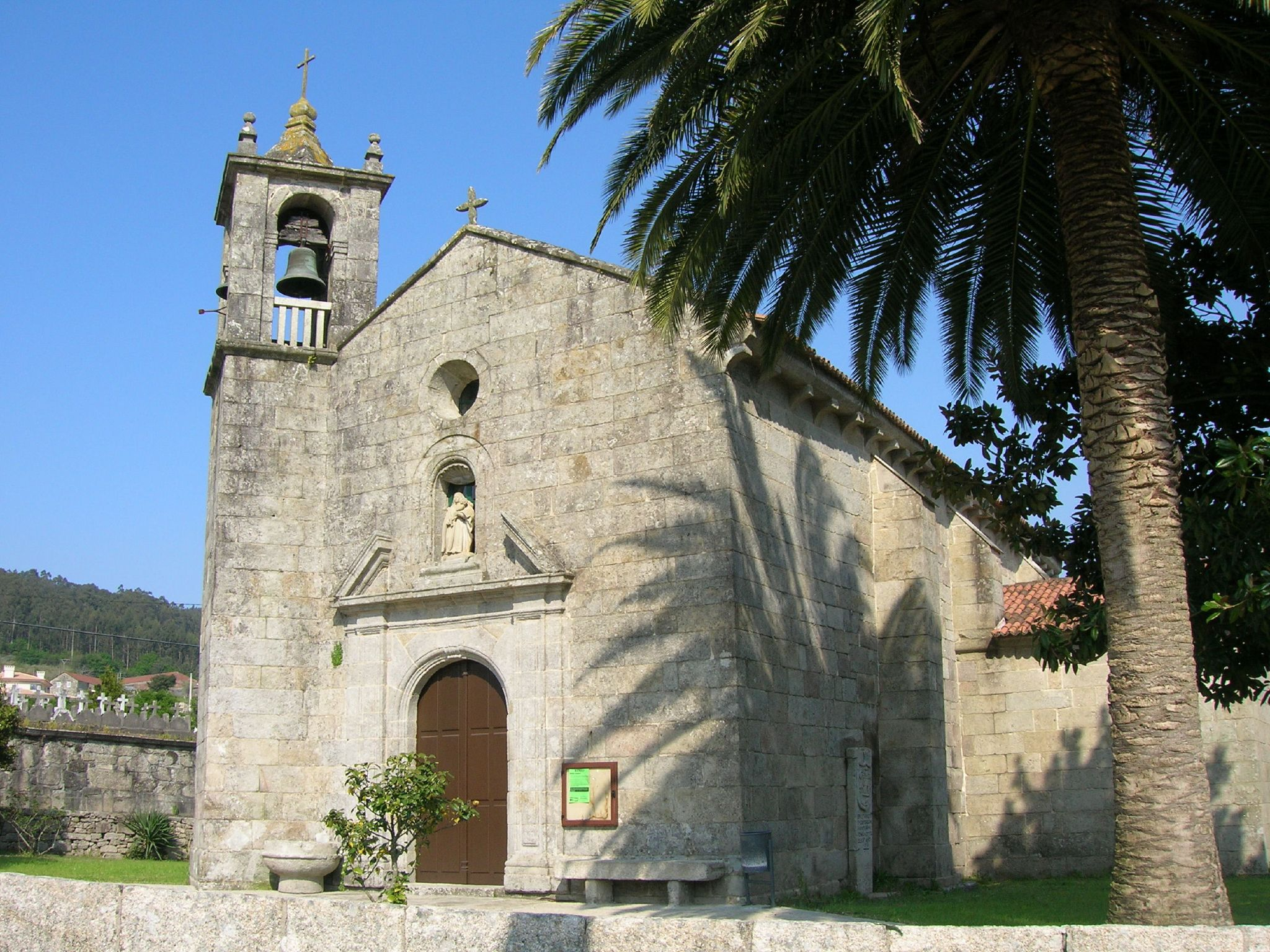 Es una iglesia románica del siglo XII, que perteneció a la Encomienda de la orden de Malta. De una sola nave y ábside pentagonal, de la antigua iglesia románica, sólo se conserva la cabecera y parte de los aleros, decorados con hermosos canecillos que reproducen temas y motivos variados.